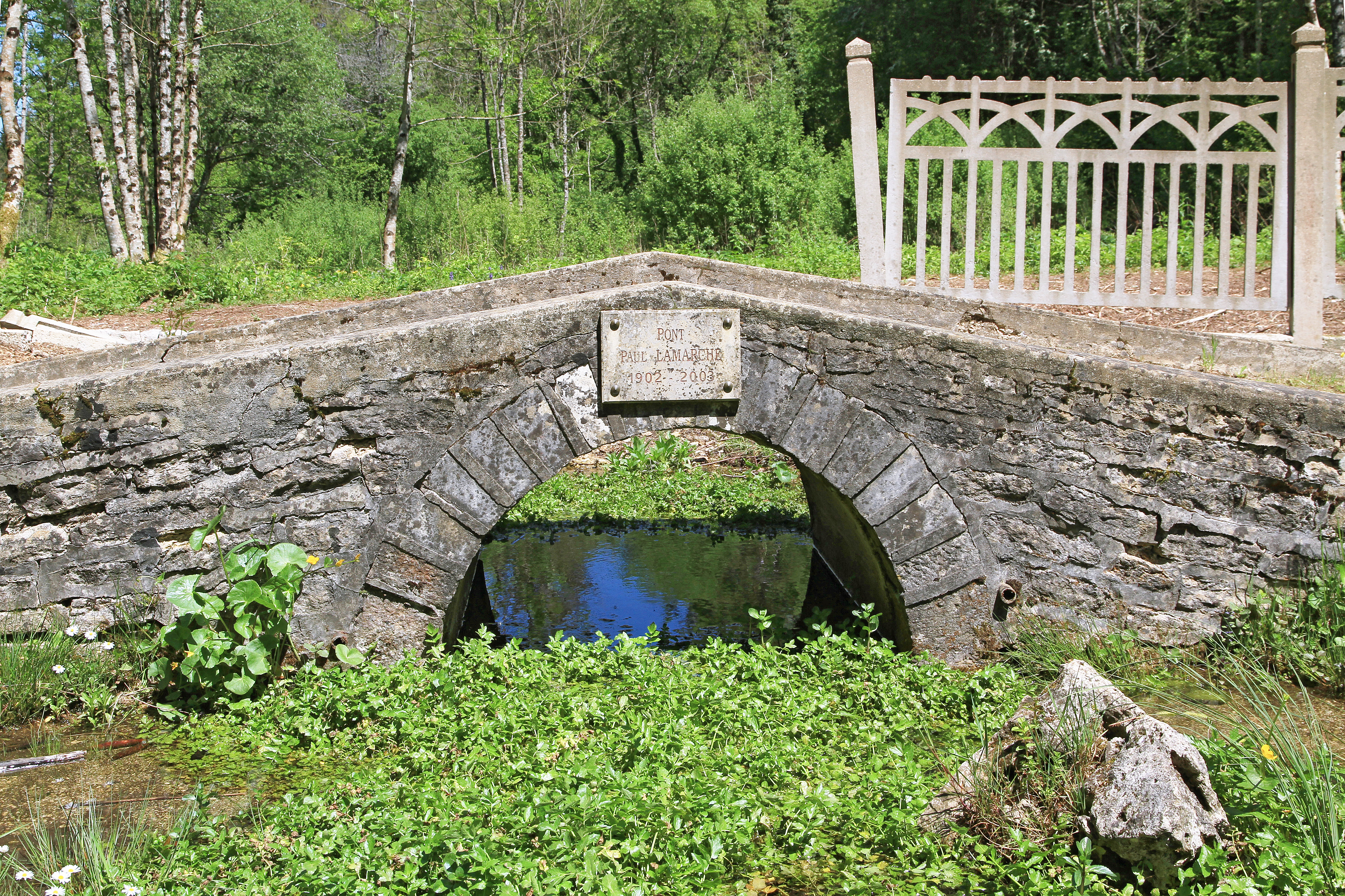 Le pont Lamarche à la source de la Seine